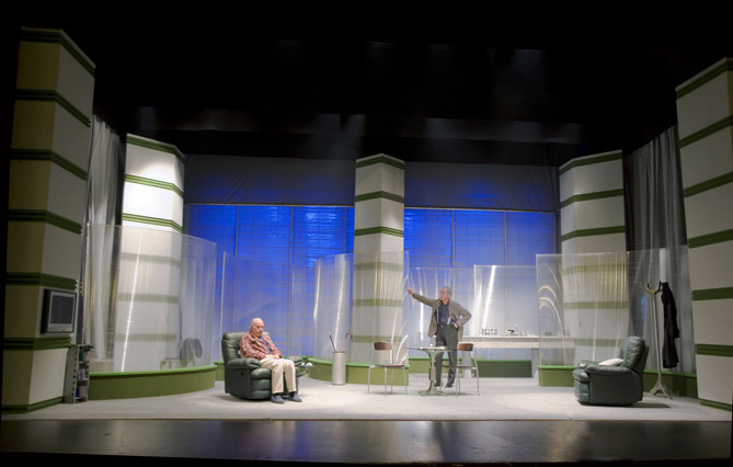 "Patético jinete del rock and roll", escrita y dirigida por Jesús Campos. Interpretada por Miguel Palenzuela y Carlos Manuel Díaz (2010)